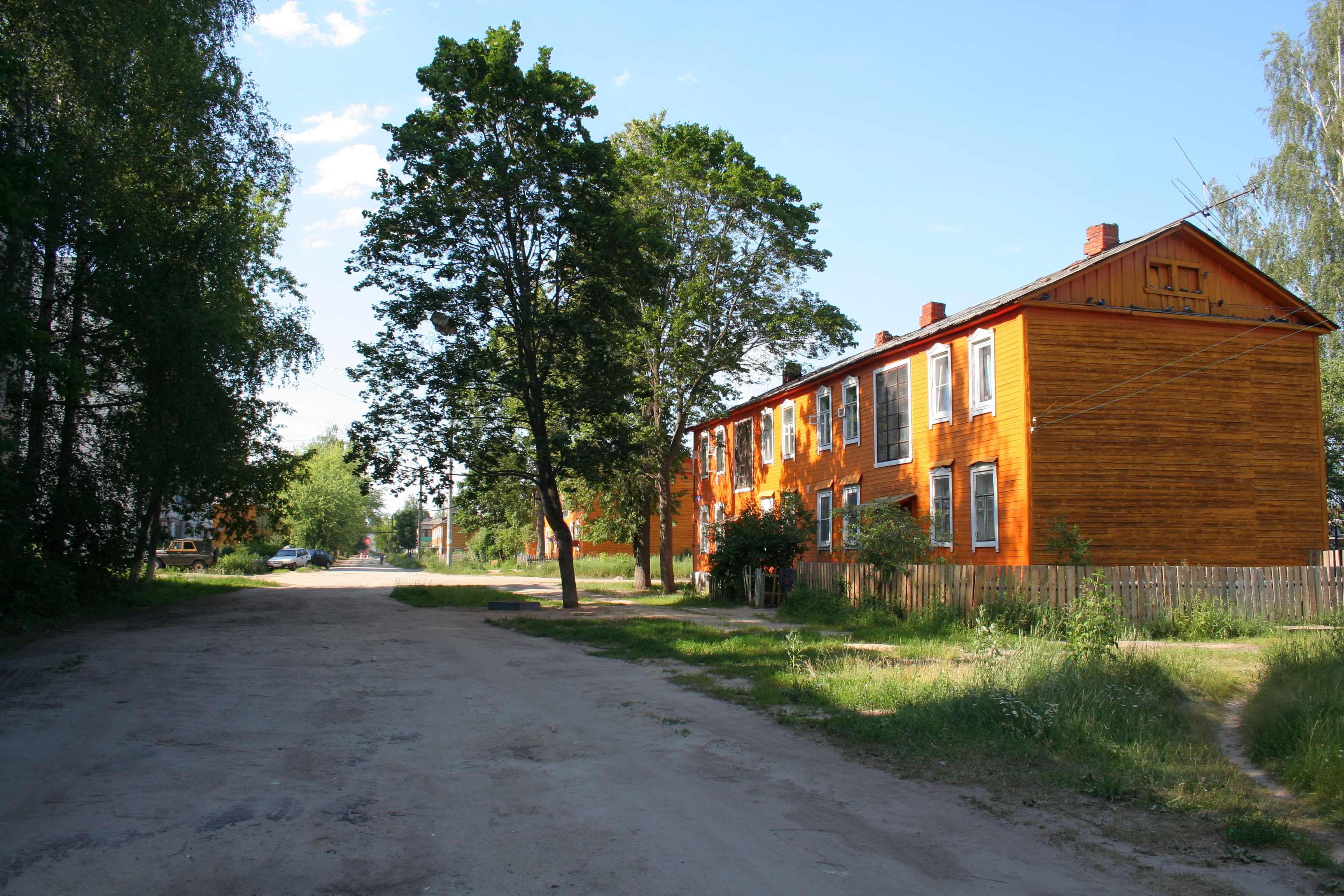 Wohnhäuser in Kosterjowo, Oblast Wladimir, Russland.